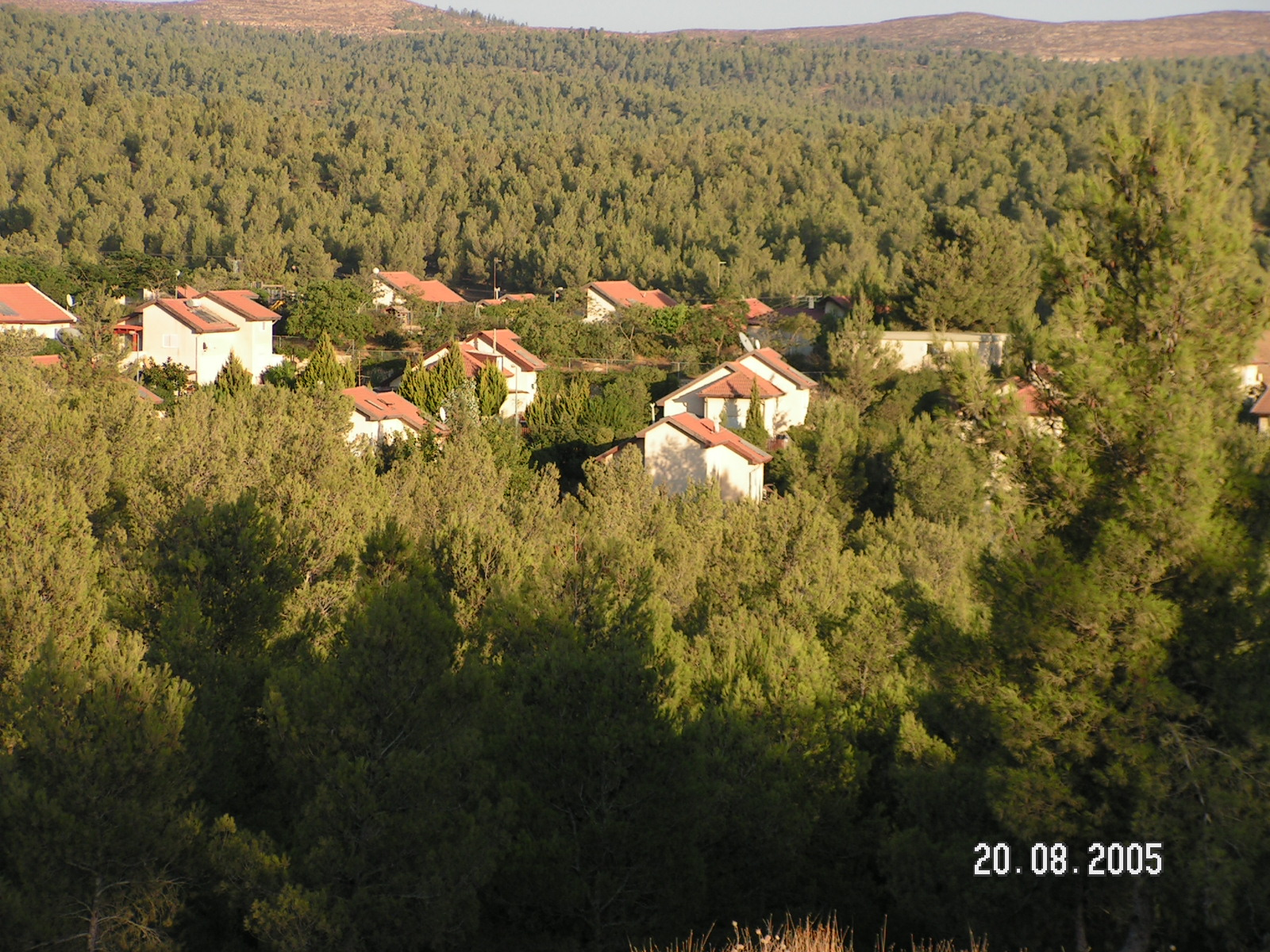 לִיבְנָה, או שני